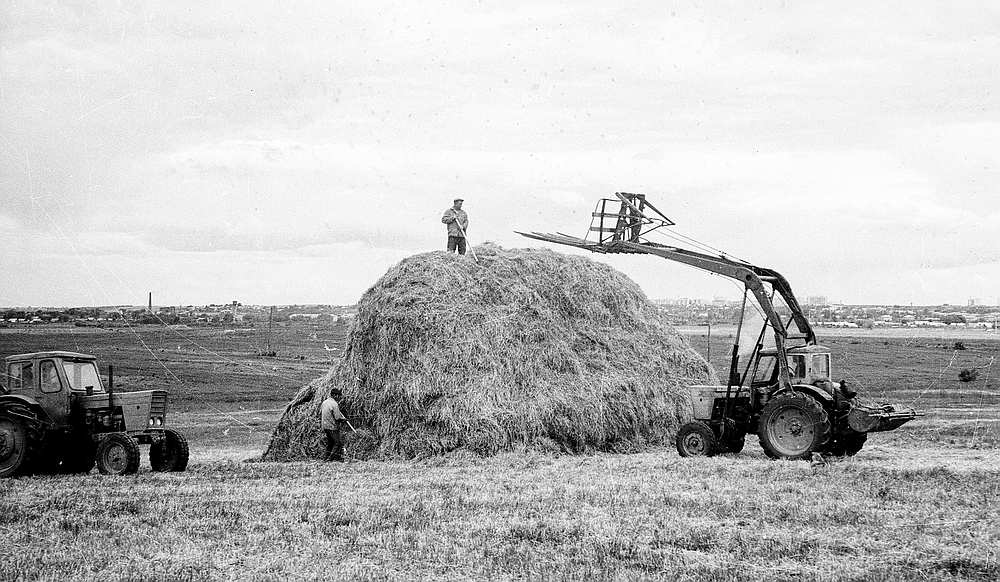 Скирдование сена в племенном совхозе «Новоселье». Первое место в заготовке кормов к первому июля занимает звено механизатора В. И. Федосеева. Механизаторы его звена собрали 1078 тонн сена и выполнили недельное задание на 154 процента. Село Веськово, Переславский район. (Переславский музей-заповедник, отдел истории советского общества, конверт 1066.)